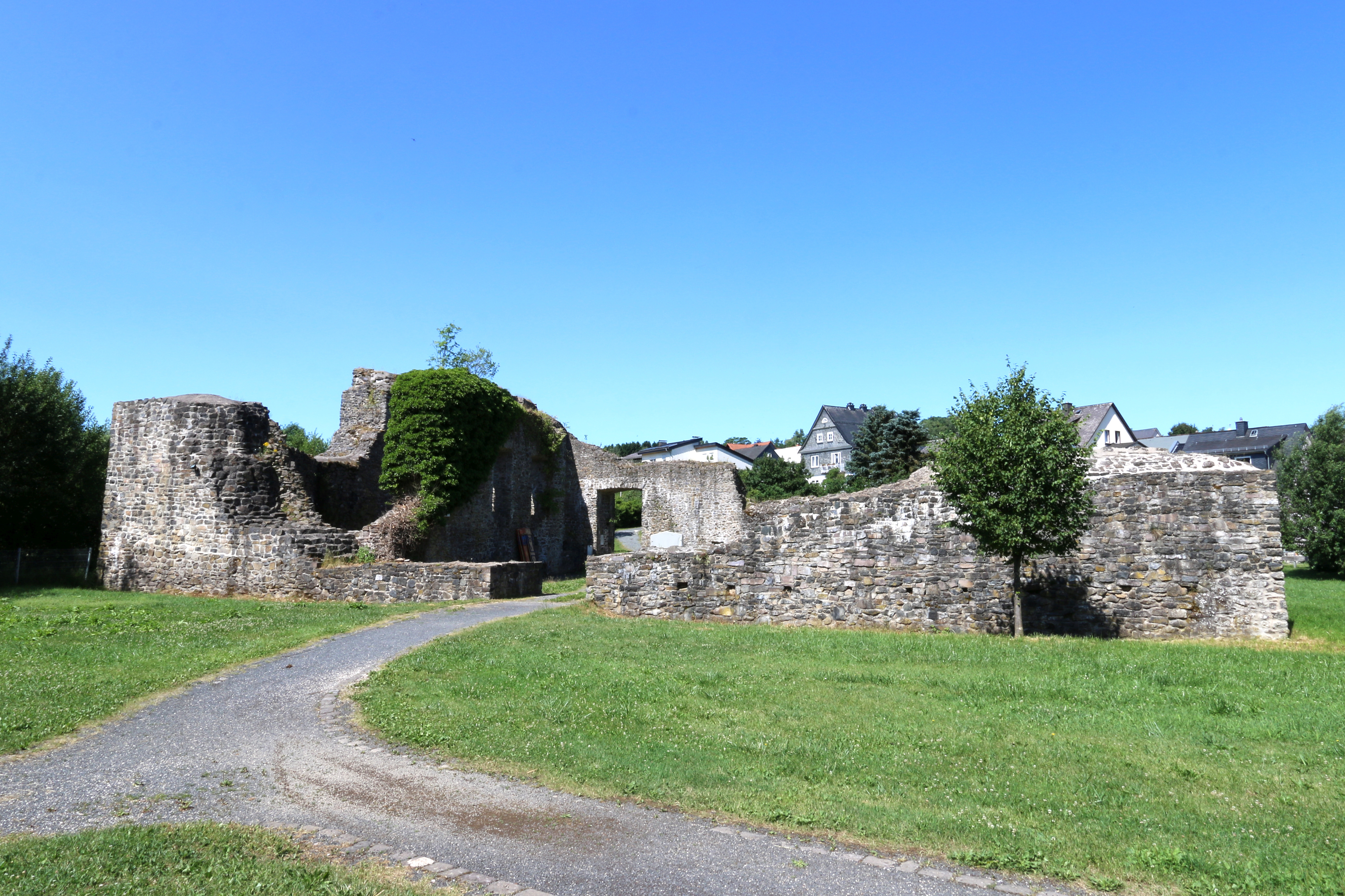 Driedorf: Unterburg Junkerwiese